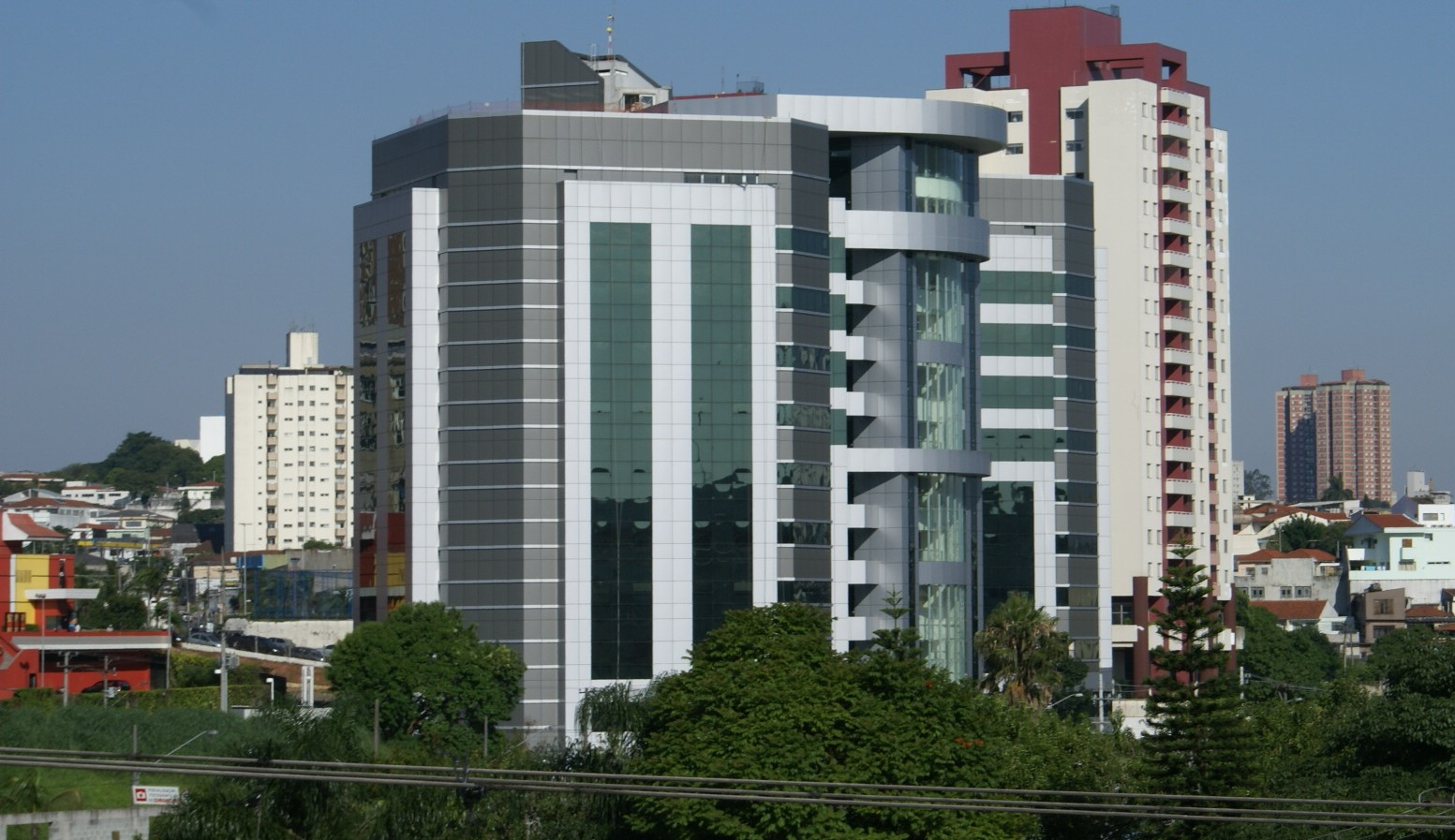 Hospital Anália Franco em São Paulo. - Anália Franco Hospital in São Paulo City.